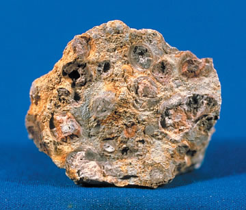 Bauxite